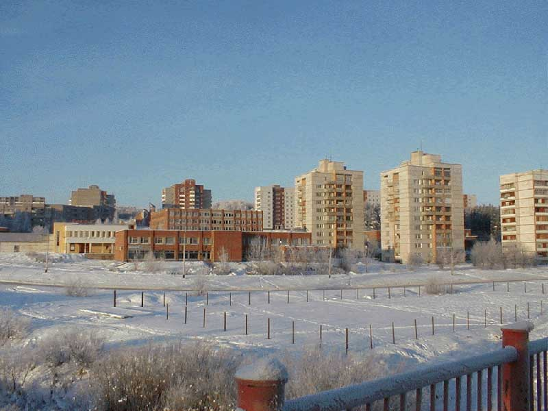 Улица Алексея Некрасова (Кирово-Чепецк, 7 микрорайон)